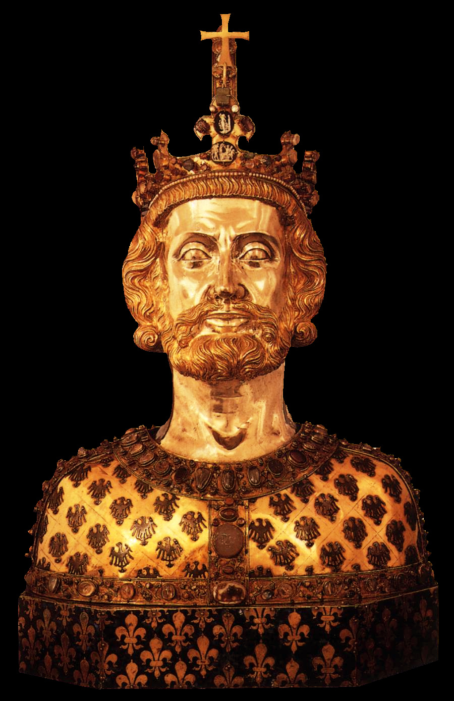 Reliquiarium Caroli Magni